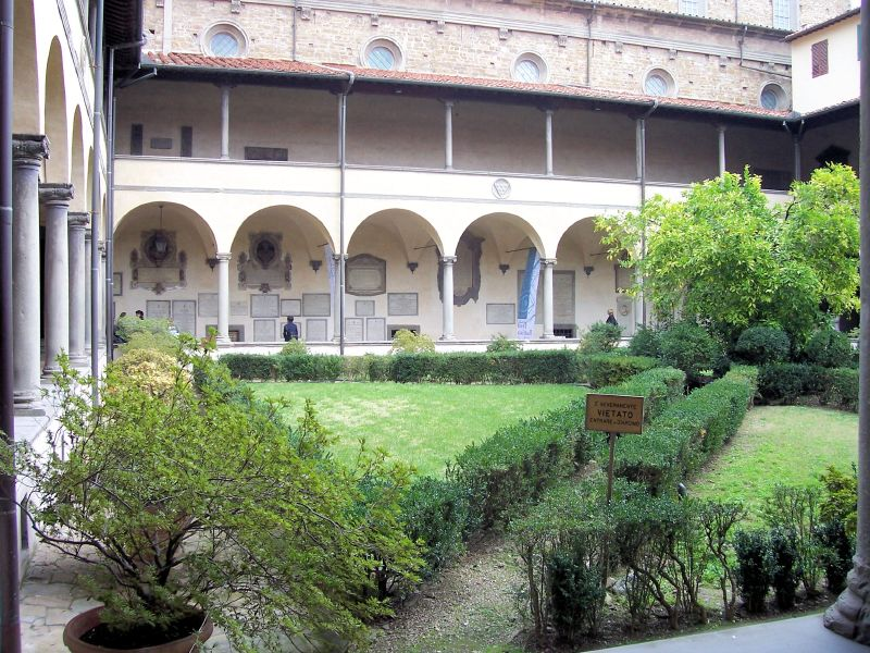 Chiostro di San Lorenzo, Firenze, Italy